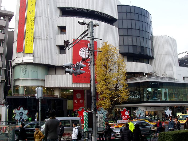 ラフォーレ原宿